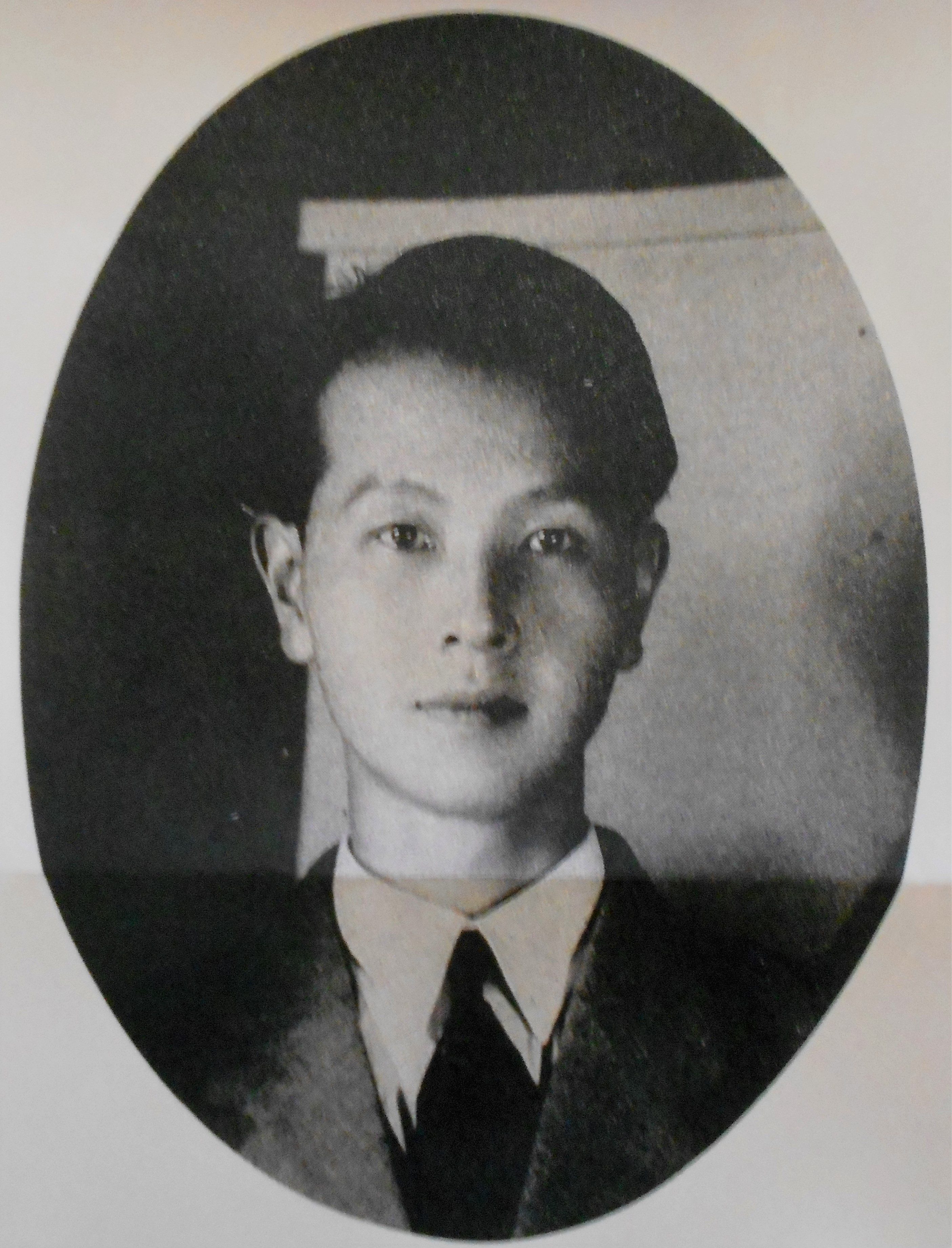 童話作家の森三郎。『赤い鳥』時代（『赤い鳥』は1936年廃刊）。